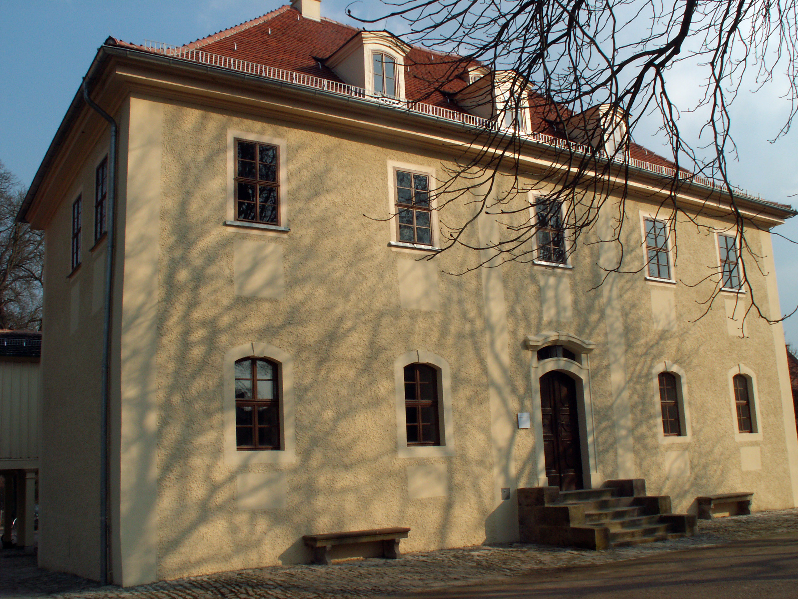 Aufgenommen auf einer Besichtigungstour des Stadtschlosses Weimar und der drei Schlösser in der nahen Umgebung: Belvedere, Tiefurt und Ettersburg .